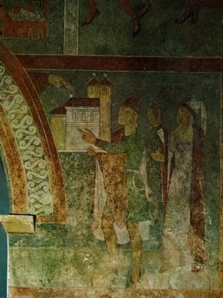 Fjenneslev kirke: kalkmaleri af Asser og hans frue Inge